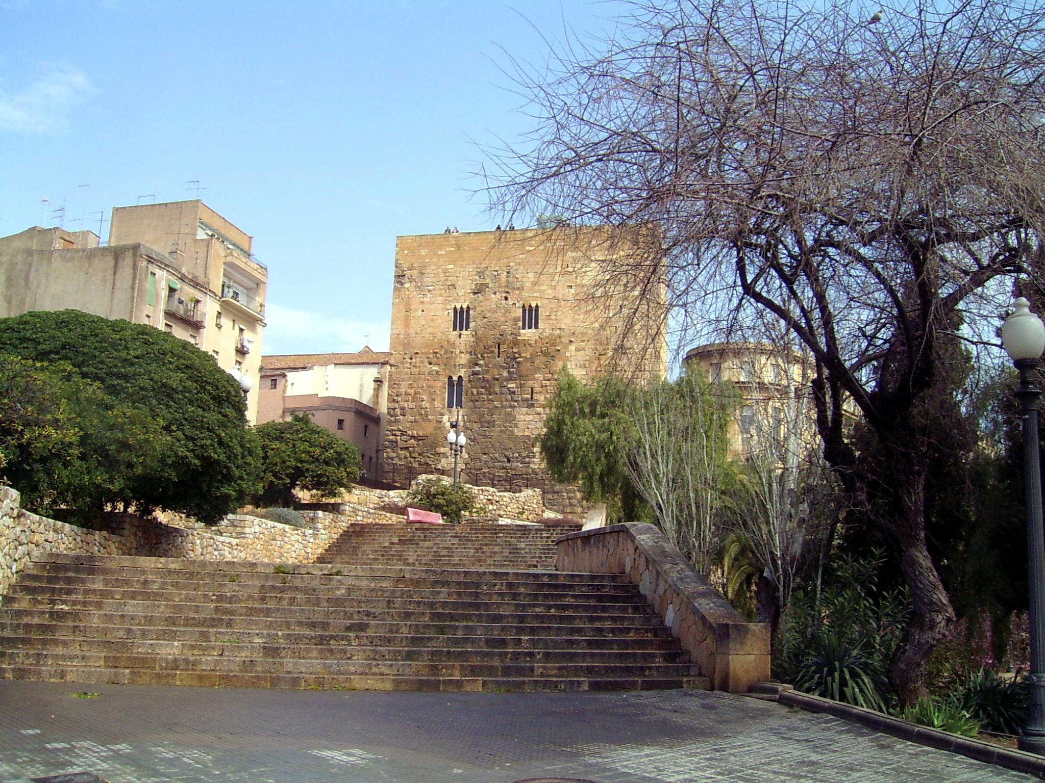 Torre del Pretori, Tarragona, (Catalunya).